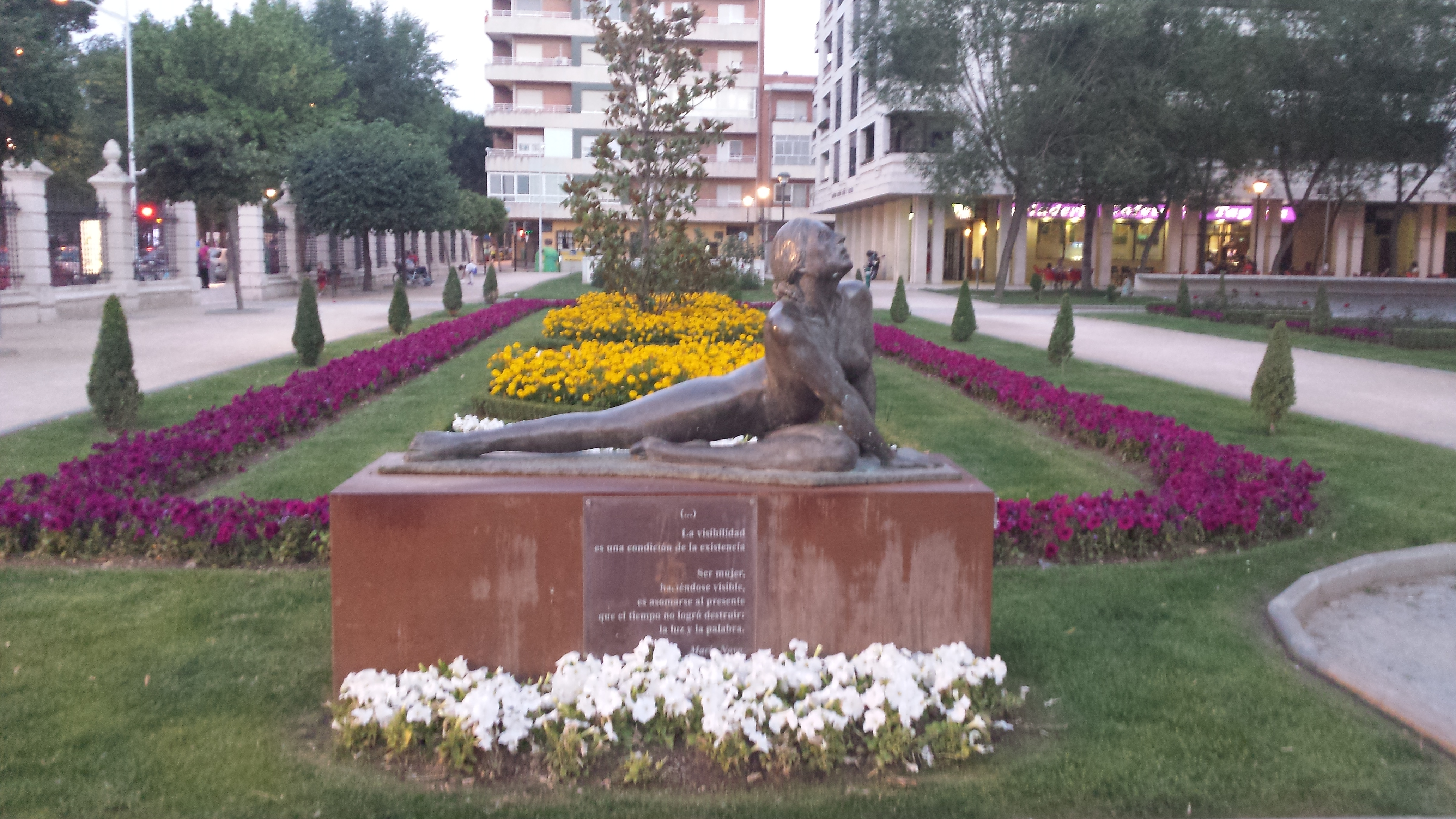 Figura Femenina. Paseo de la Cuba. Albacete